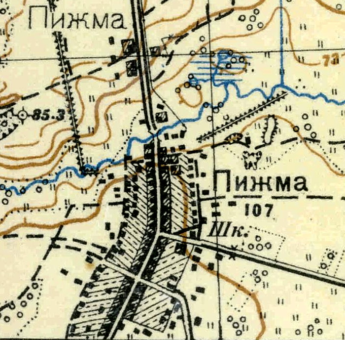 Топографическая карта Ленинградской области, квадрат О-36-13-А-г, деревня Пижма